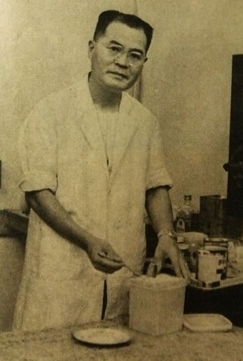 糠漬けを漬ける桶谷繁雄